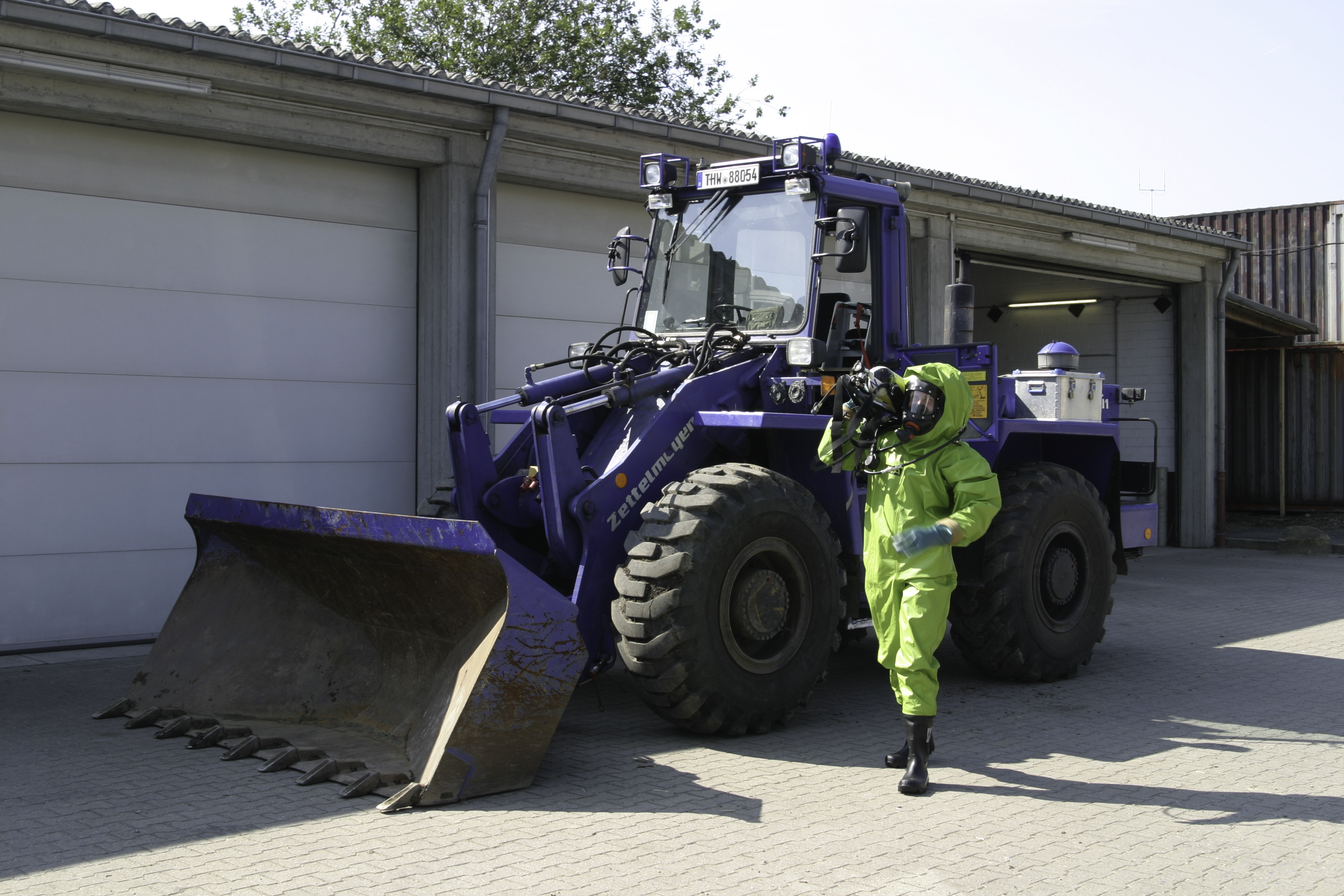 Helfer der SEB-ABC vor einem Bergungsräumgerät des THW